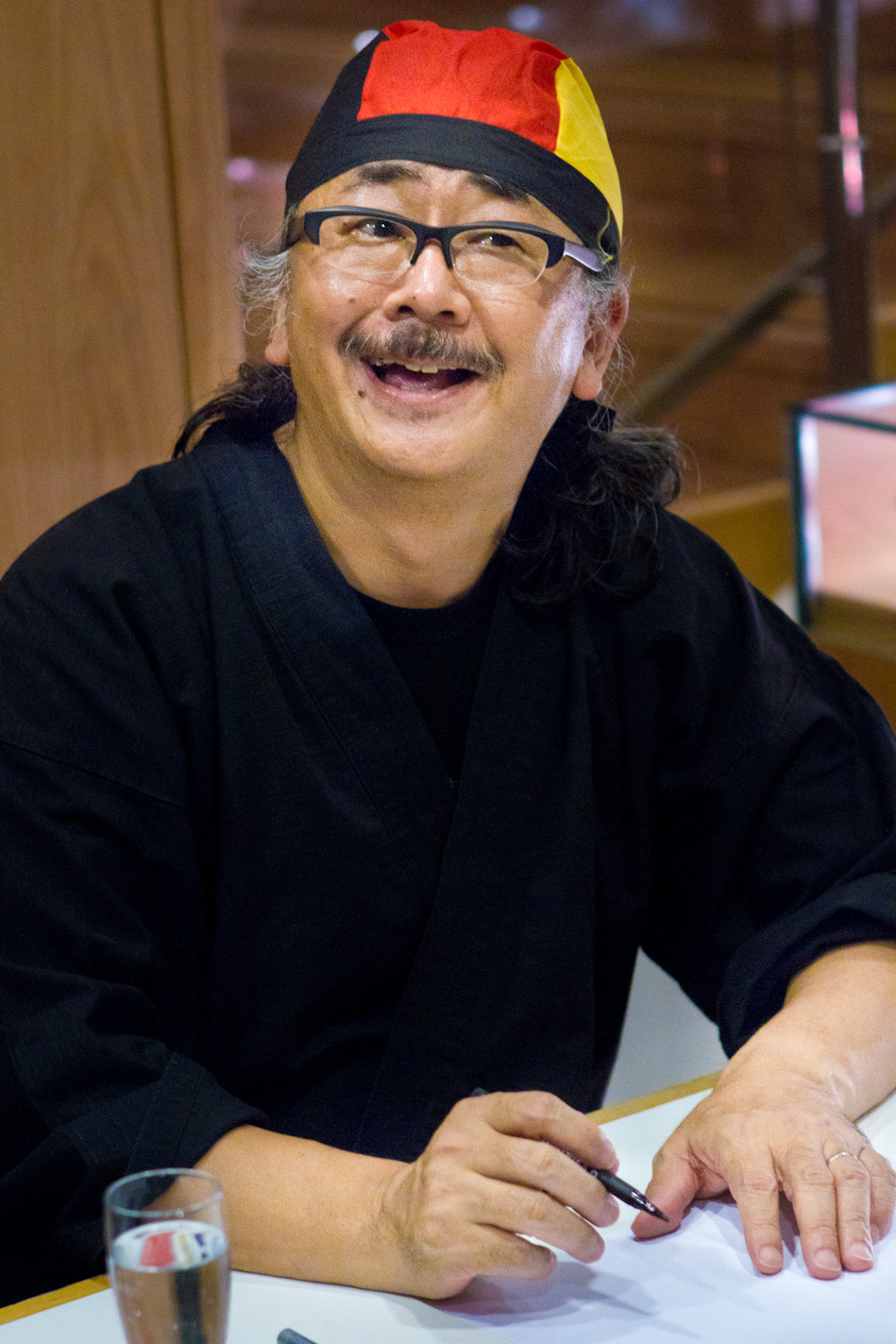 Nobuo Uematsu bei einer Signierstunde in der Kölner Philharmonie 2011